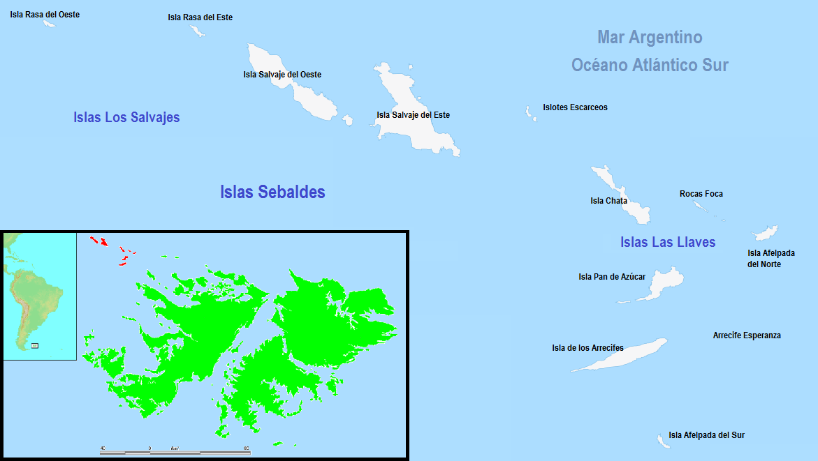 Mapa de las Islas Sebaldes con la toponimia argentina depositada en los mapas de la ONU